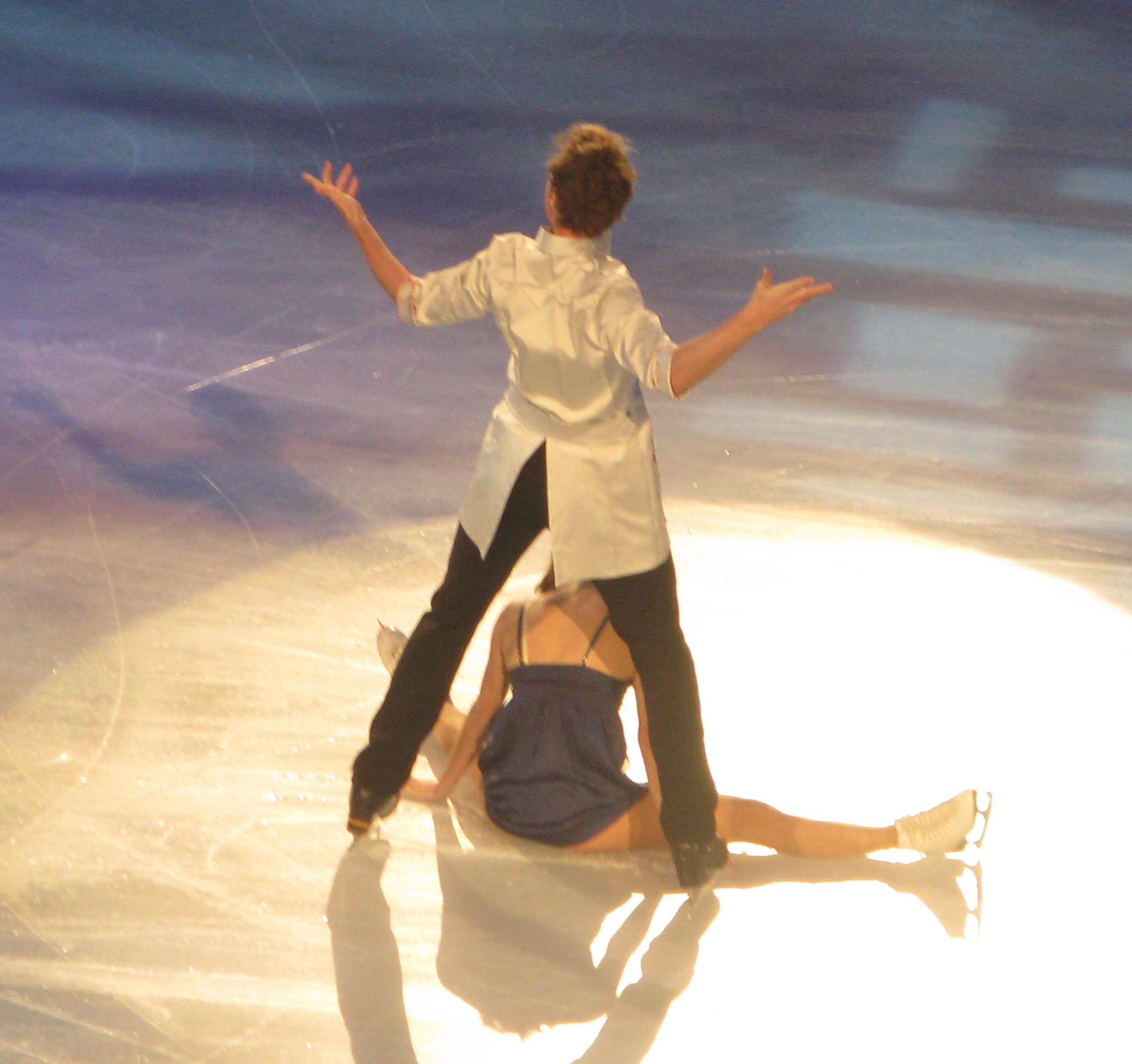 Nathalie Péchalat et Fabian Bourzat lors du gala du trophée Éric Bompard 2013 à Paris-Bercy.